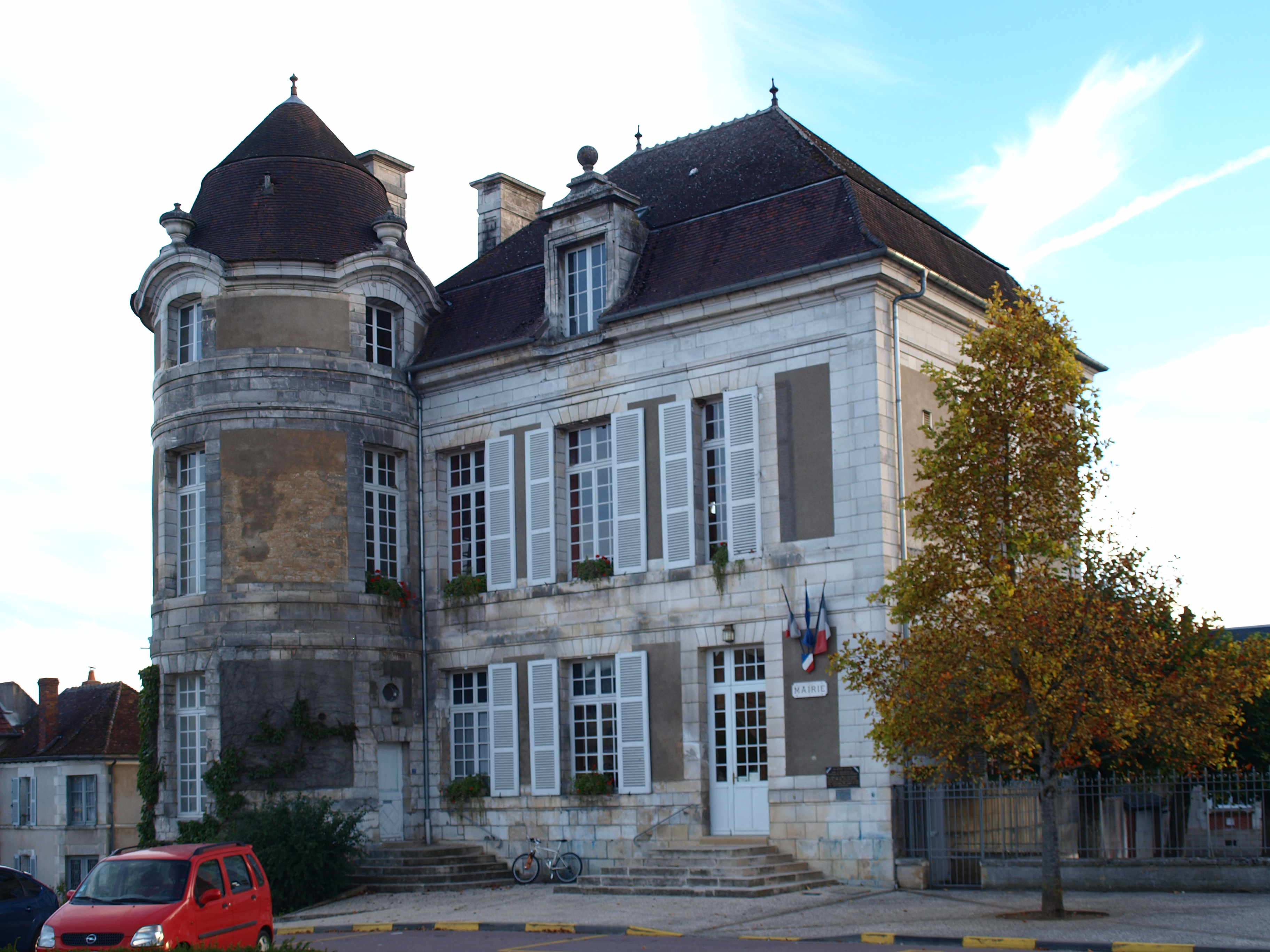 Courson-les-Carrières (Yonne, France) ; la mairie.